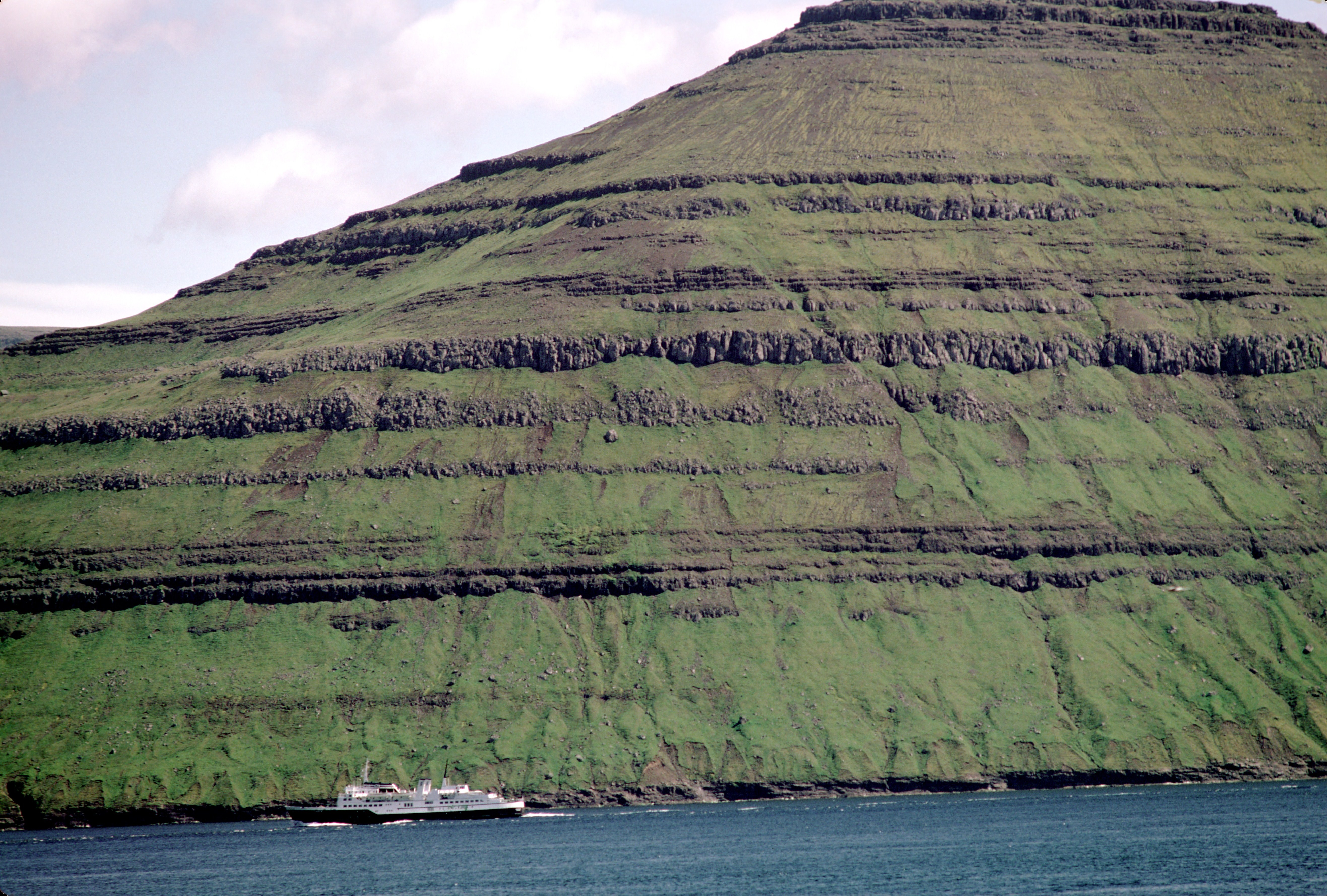 Un ferry naviguant dans le Leirvíksfjørður, le long des hautes falaises presque verticales de l' île de Kalsoy, non loin de Leirvík. Ce navire qui mesure pourtant 93 mètres de long apparaît comme minuscule par rapport aux falaises de plusieurs centaines de mètres de hauteur qui tombent quasiment à pic dans la mer. La hauteur moyenne des falaises de Kalsoy est d' environ 500 mètres. La largeur moyenne de l' île n' est que de 600 mètres. Le présent ferry-boat est le "Smyril" qui a appartenu à la compagnie de navigation Strandfaraskip Landsin de 1975 à 2005. Le "Smyril" (ancien "Morten Mols") a été construit en 1969 au Danemark. Ce navire peut accueillir 800 passagers et transporter 135 voitures. Il a été utilisé pour assurer des liaisons maritimes entre les îles des Îles Féroé, vers le Danemark, l' Ecosse, la Norvège et l' Islande. IMO: 6906529. Eysturoy, Îles Féroé.